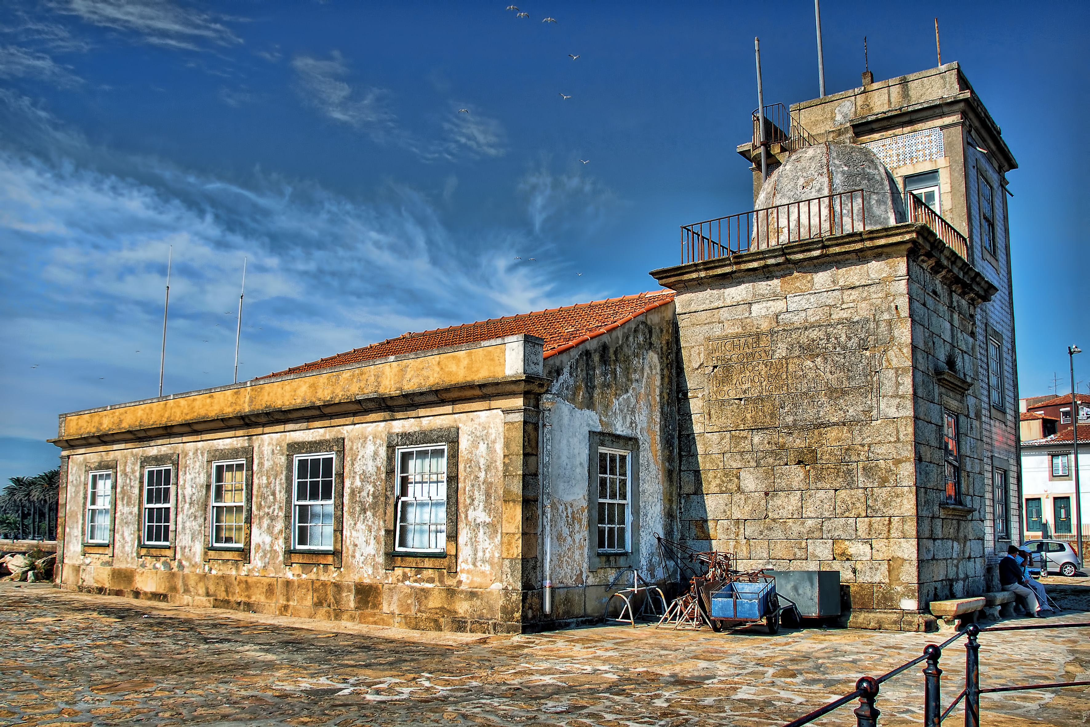 Torre, Capela, Farol ou Ermida de S. Miguel-O-Anjo This file was uploaded for Wiki Loves Monuments in Portugal with the unique identifier 74770.